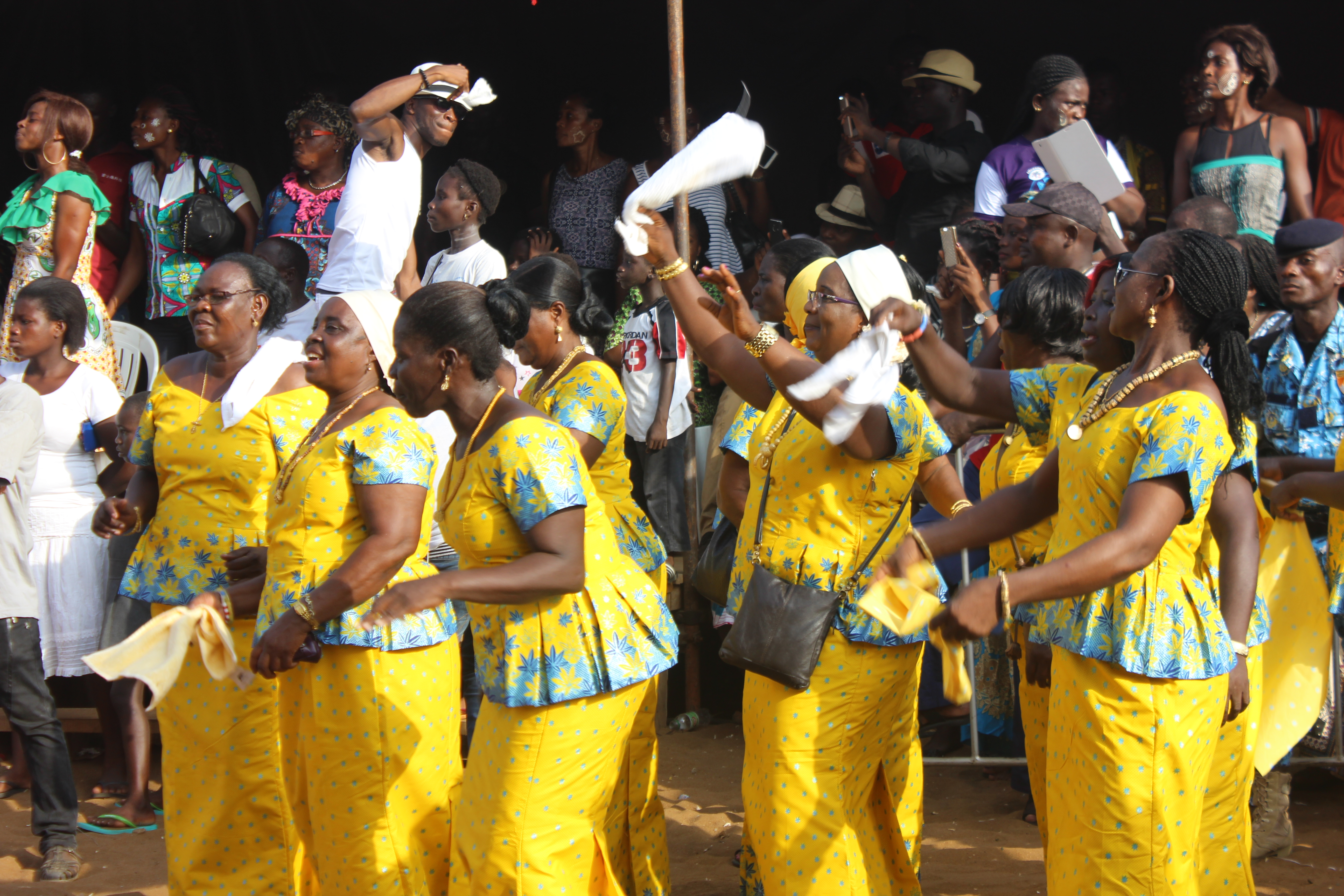 Danse de femmes à l'Abissa 2016